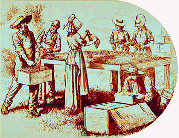 L’emmaganisage et le tri du raisin au Québec.Version inversée, tronquée et réduite d'une illustration légendée « L'emmagasinage » publiée dans L’opinion publique, vol 10, no 44, p. 519 (30 octobre 1879) [1].